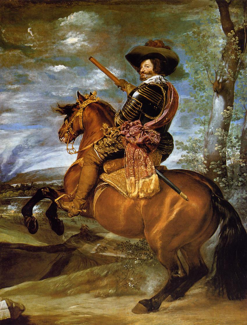 Retrato ecuestre de Gaspar de Guzmán y Pimentel (1587-1645), conde-duque de Olivares y valido del rey Felipe IV de España hasta que cayó en desgracia en 1643.